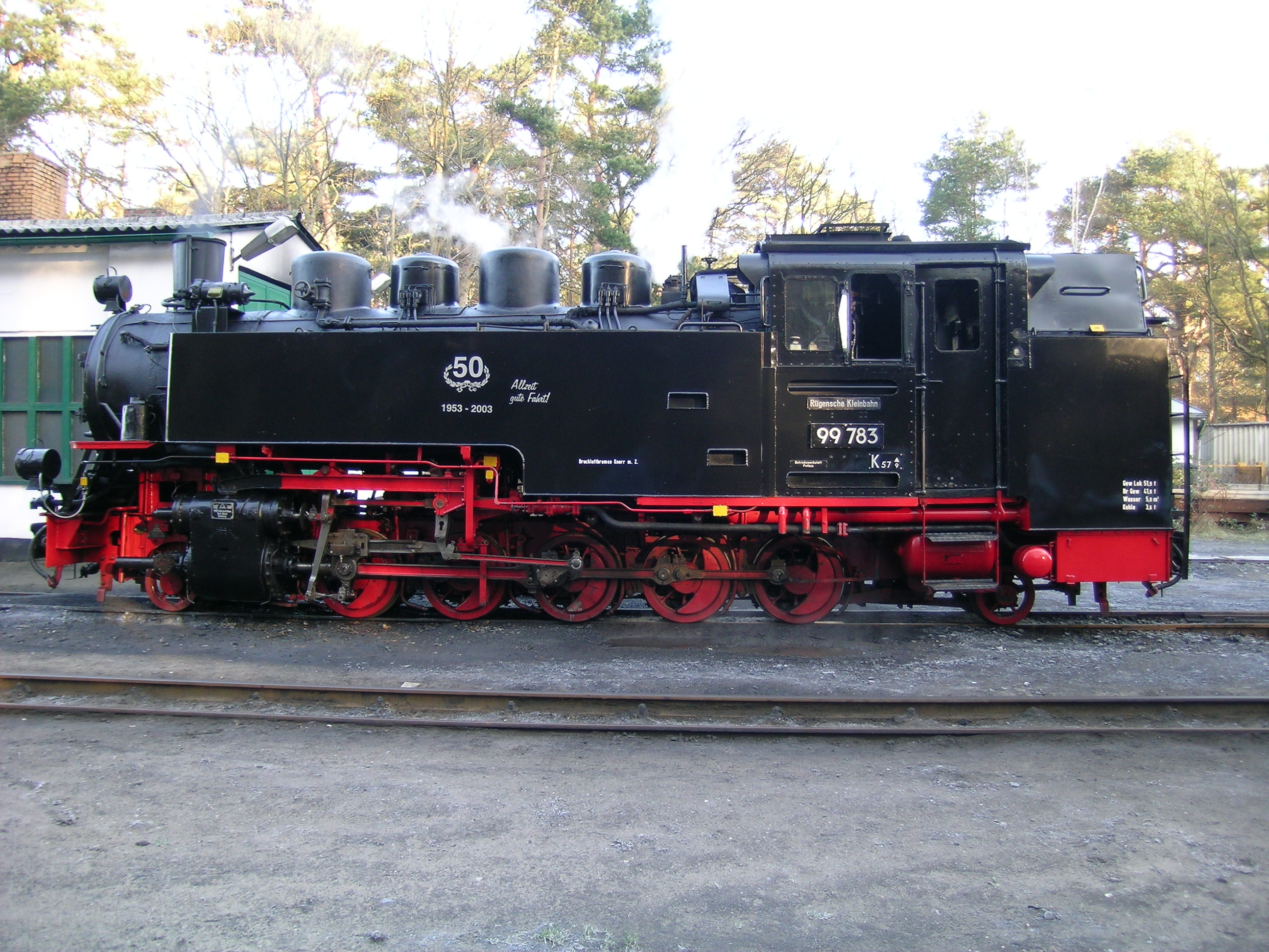 Lok 99783 zum 50. Jubiläum der Rügenschen Kleinbahn